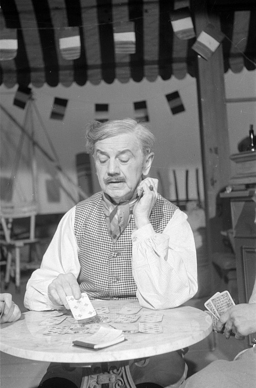 Original image description from the Deutsche FotothekSzenenbilder & Porträt Hans Leibelt in der Rolle des César